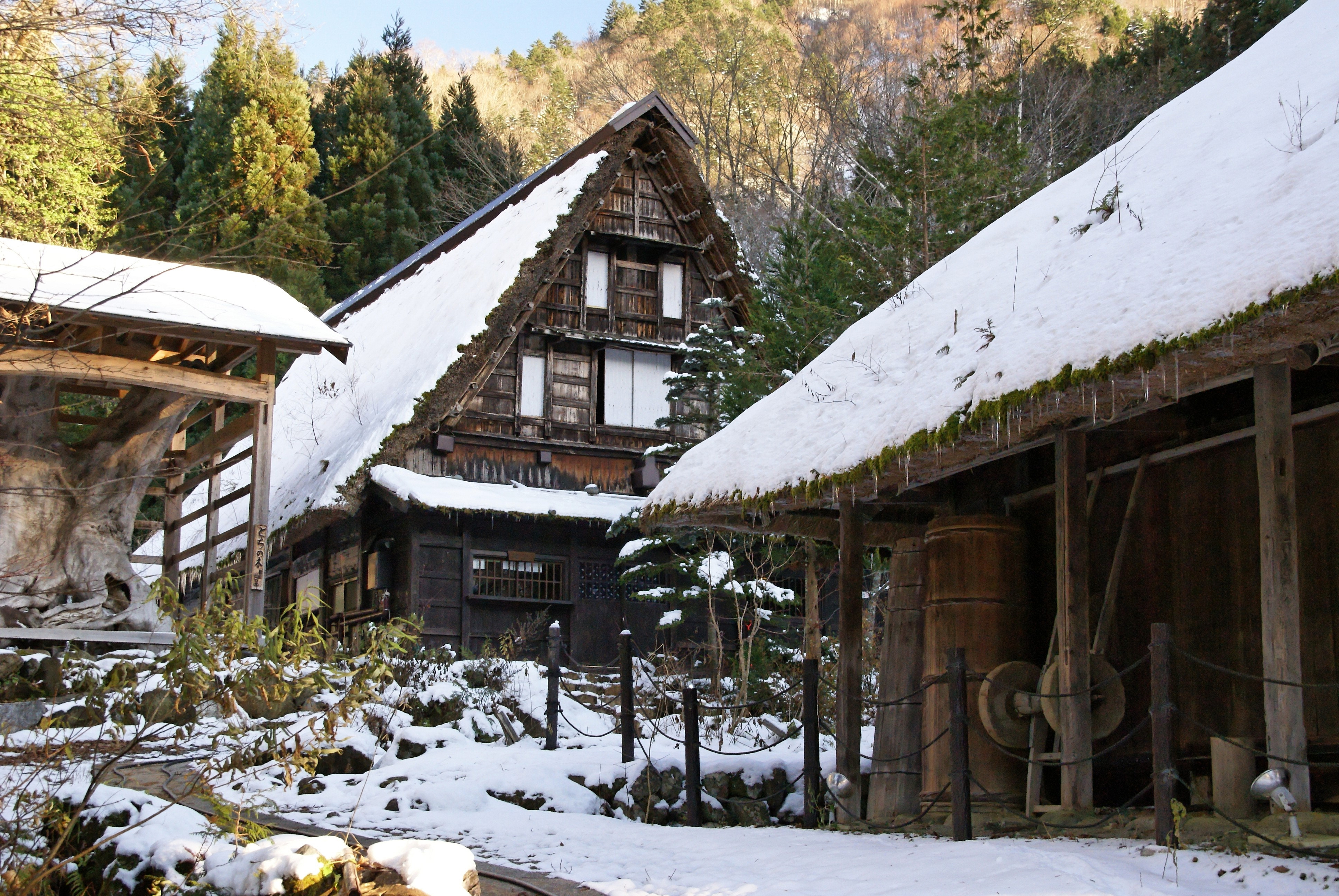 Hirayu Minzokukan in Takayama, Gifu prefecture, Japan